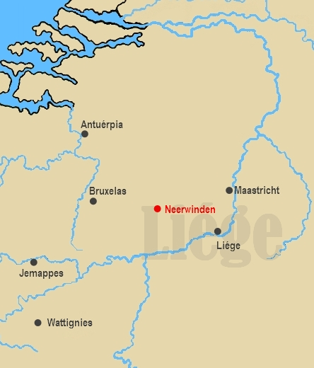 Mapa com a localização de Neerwinden